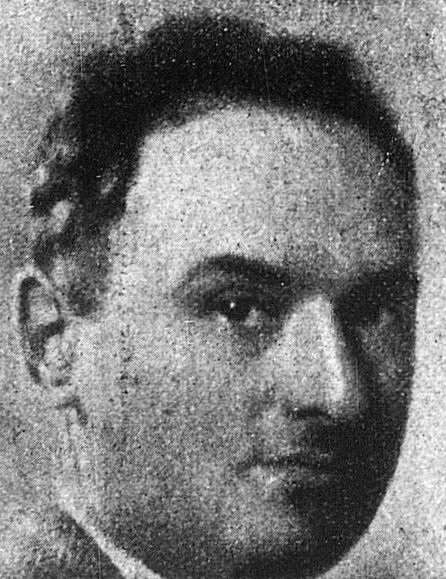 Maksymilian Centnerszwer 1933